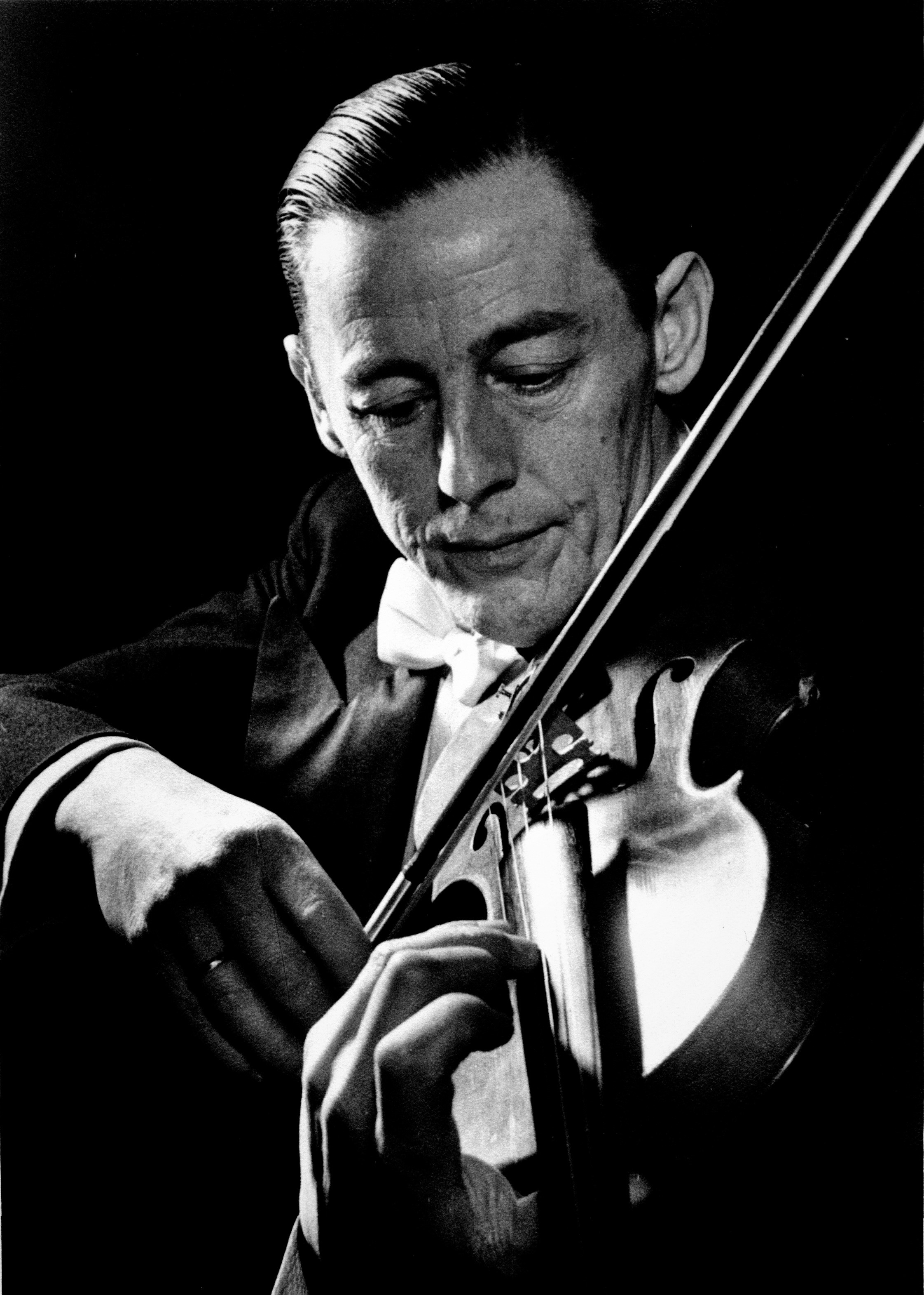 Quelle: privat